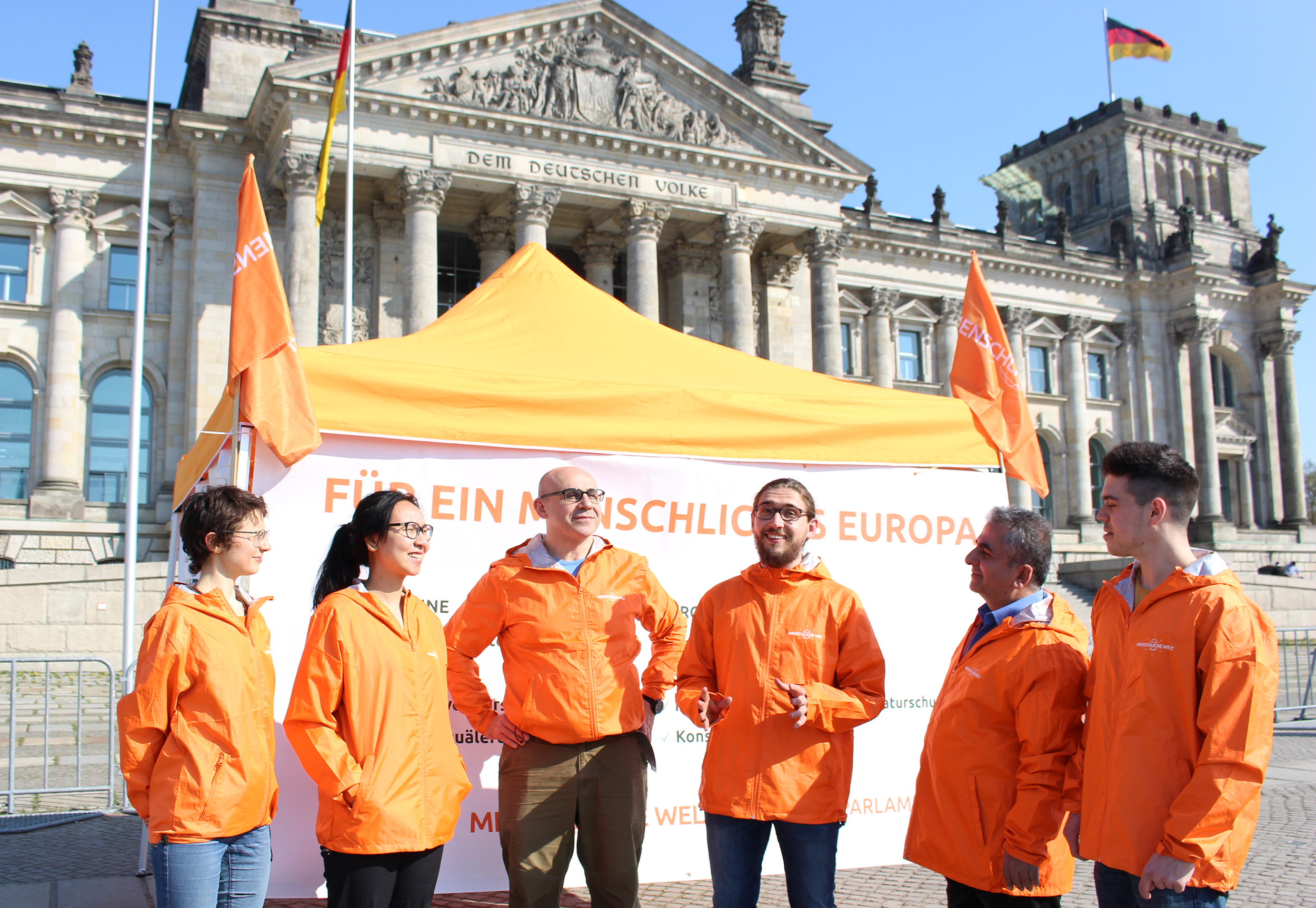 Wahlveranstaltung zur Europawahl 2019 vor dem Bundestag